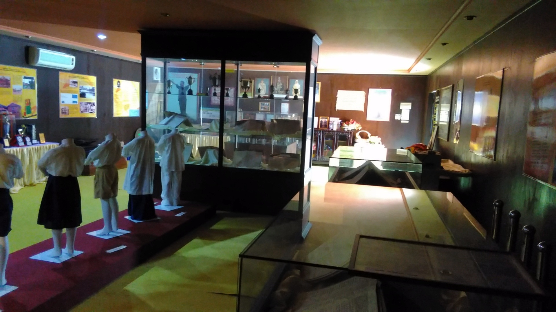 Ruang 2